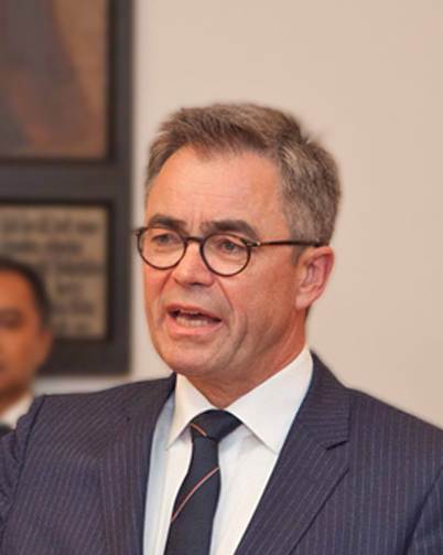 Jos Wienen